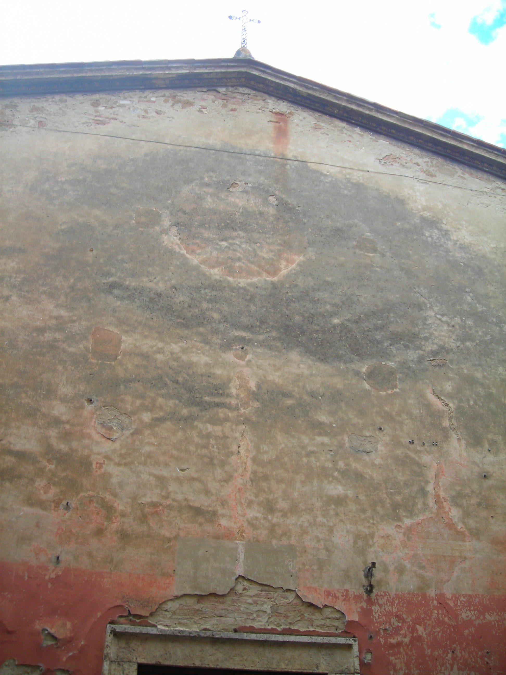 Nella parte superiore della chiesa della Cura delle S.S. Flora e Lucilla in Montisi, provincia di Siena, si trovano le tracce del rosone chiuso nell'Ottocento, il bel cornicione in pietra scolpito e la croce in ferro battutto.